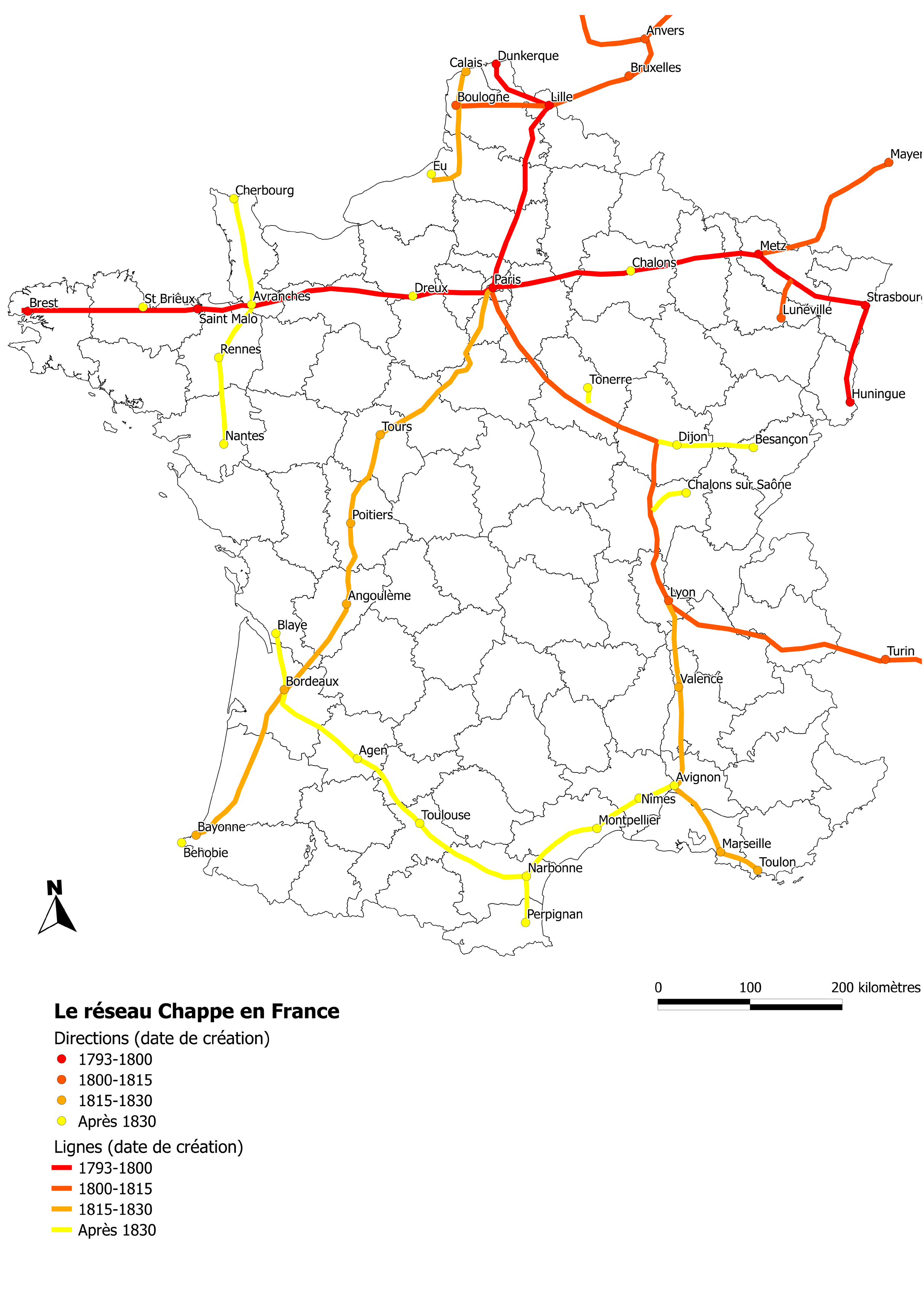 Le réseau Chappe en France d'après "La télégraphie Chappe", FNHAR, 1993. Fonds de carte : IGN, GEOFLA® sous licence ouverte réutilisable pour des utilisations commerciales et non commerciales.